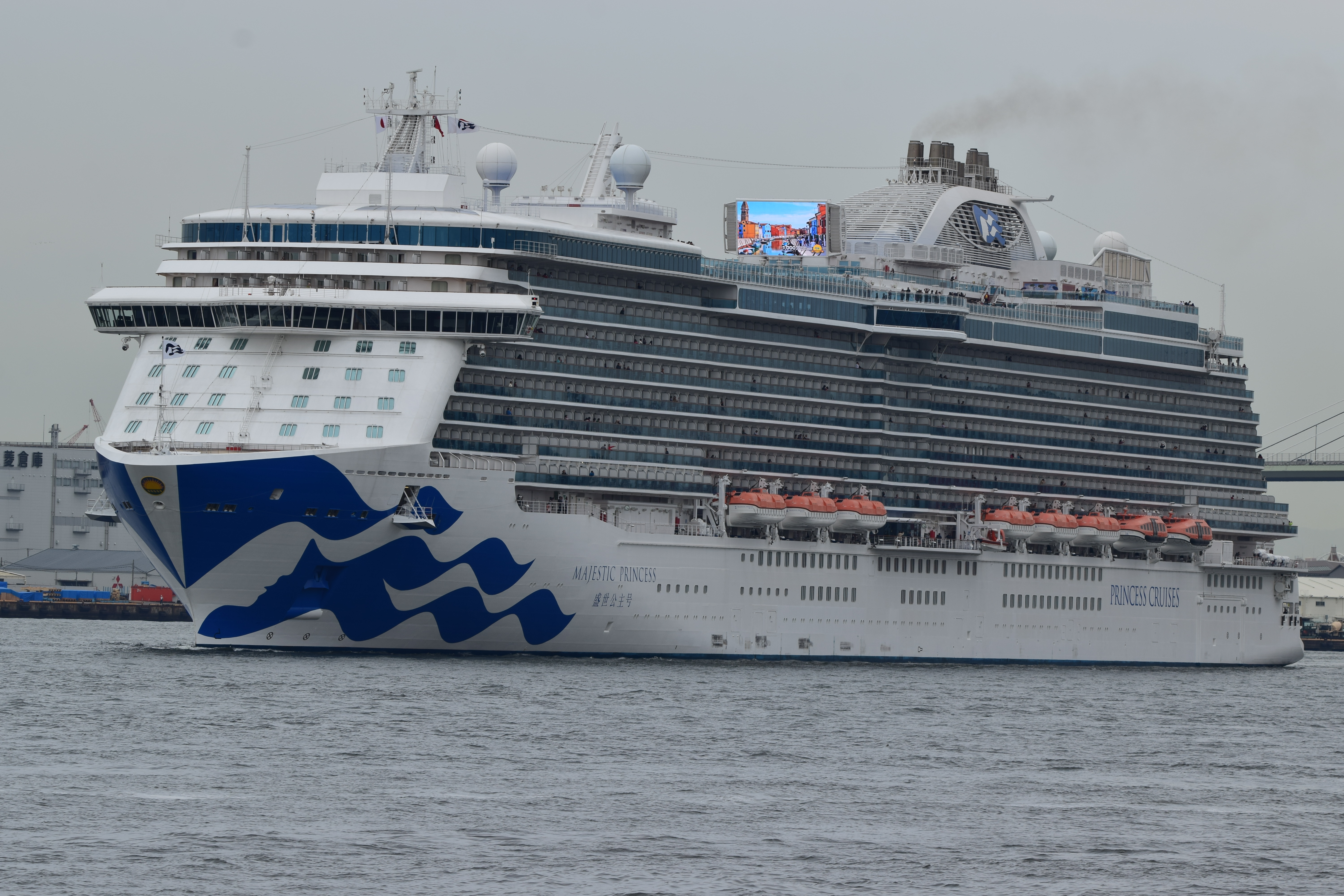 大阪天保山客船ターミナルから離岸するマジェスティック・プリンセス